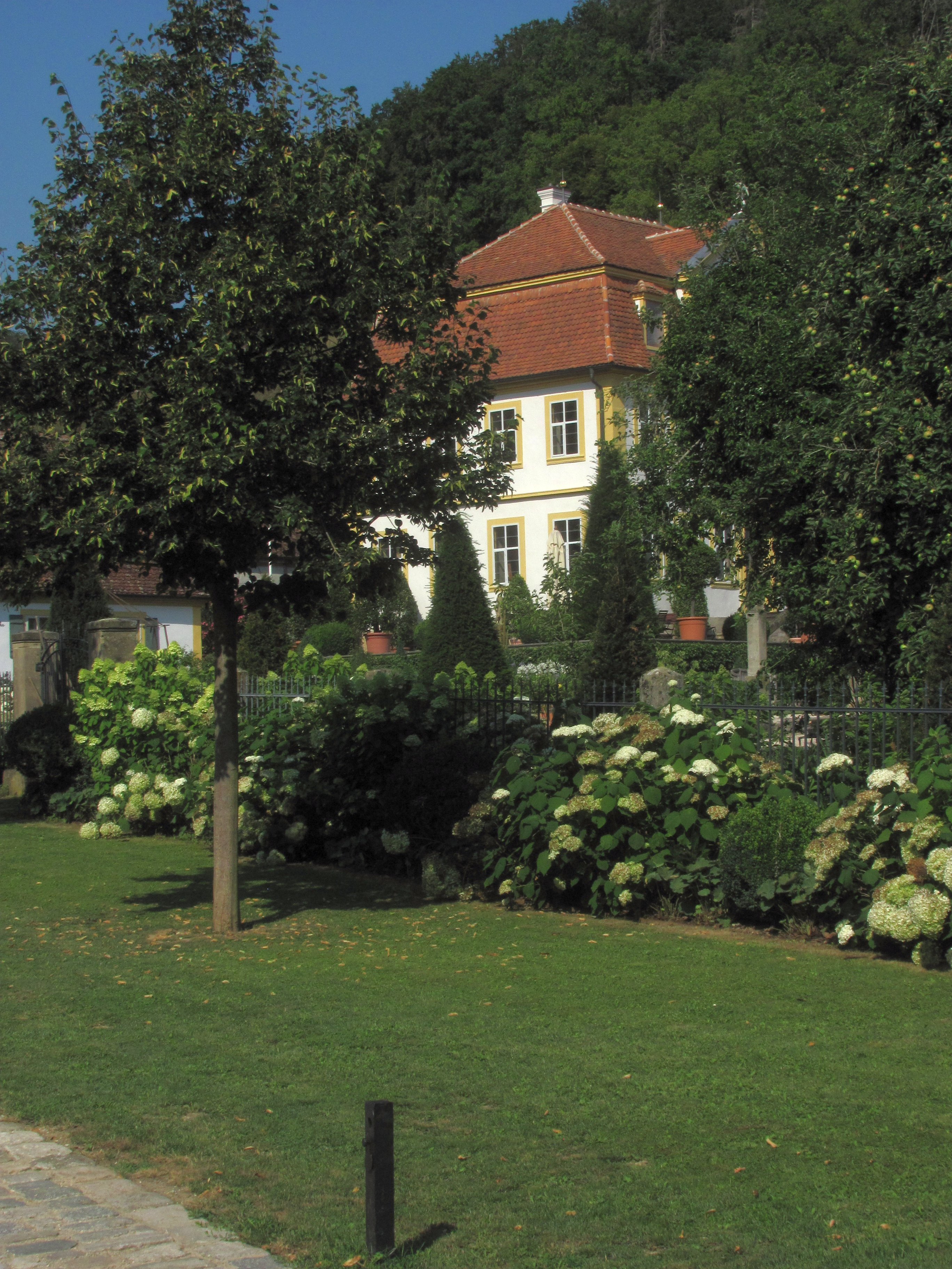 Schlösschen des Gutshofs Hohbach (Ortsteil von Rothenburg ob der Tauber); Bayerische Denkmalliste Nr. D-5-71-193-717